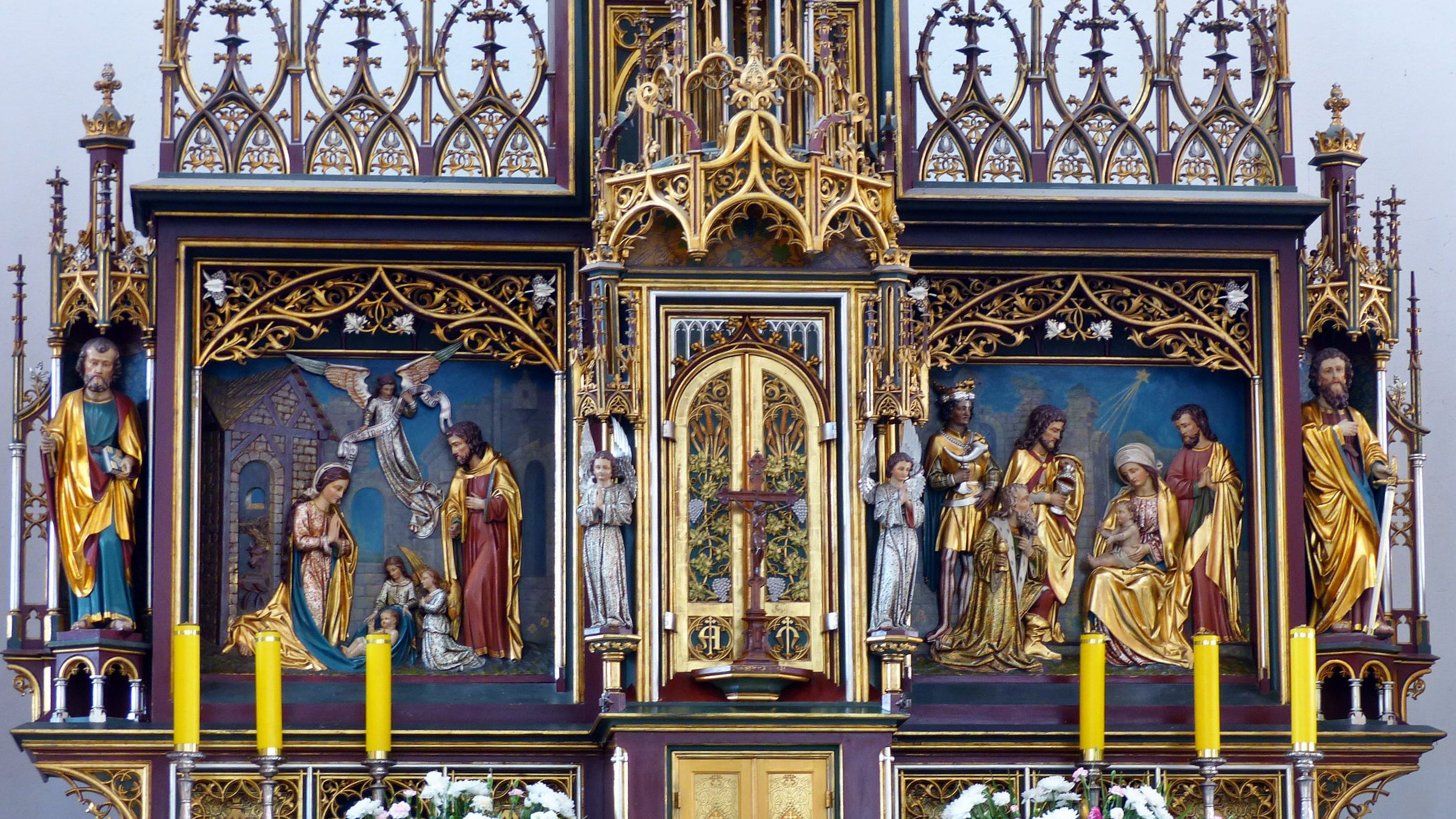 W kolegiacie w Lidzbarku Warmińskim.